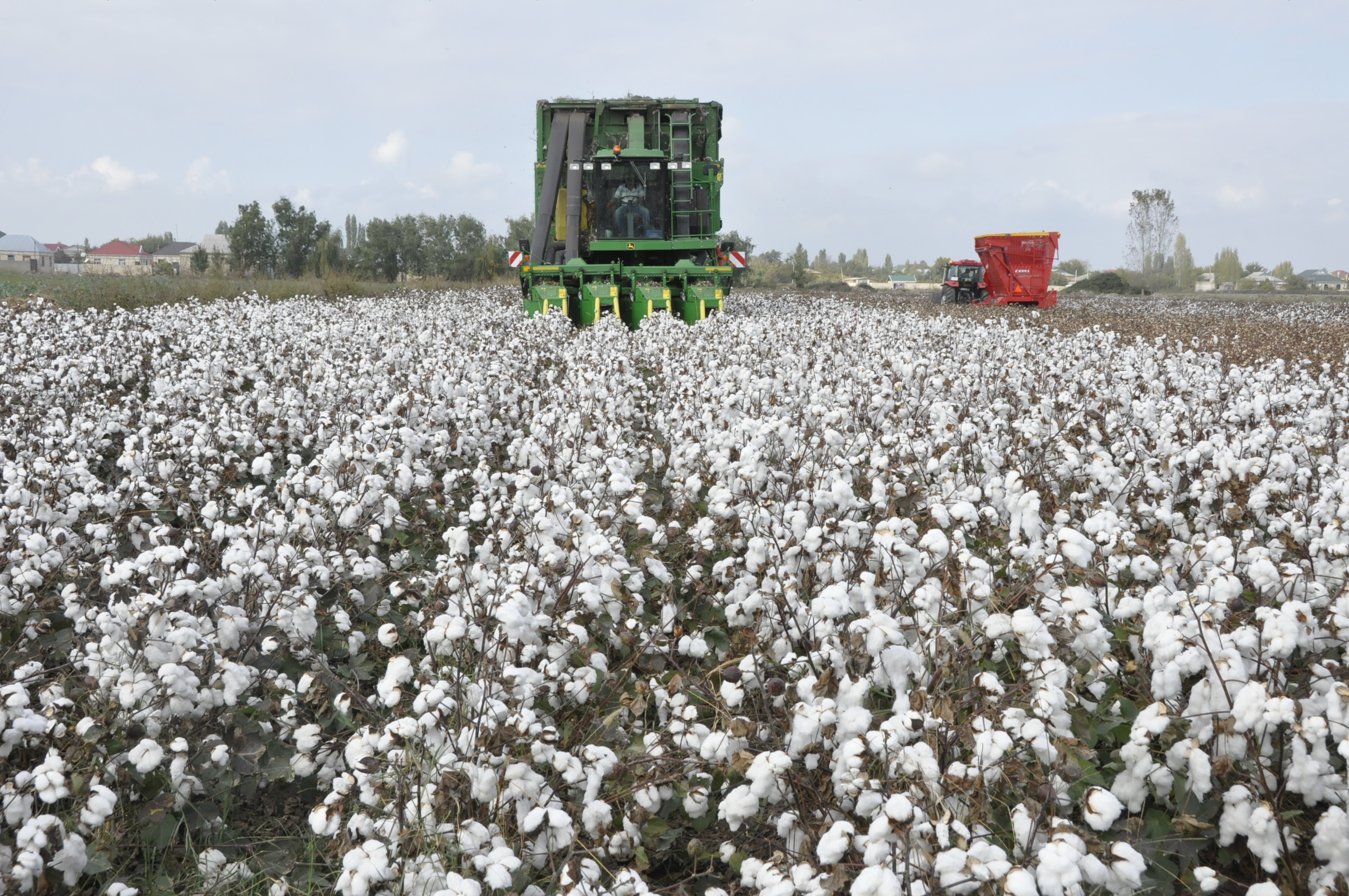 "Azərpambıq ASK" MMC-nin Bərdə rayonunda yerləşən pambıq plantasiyası.